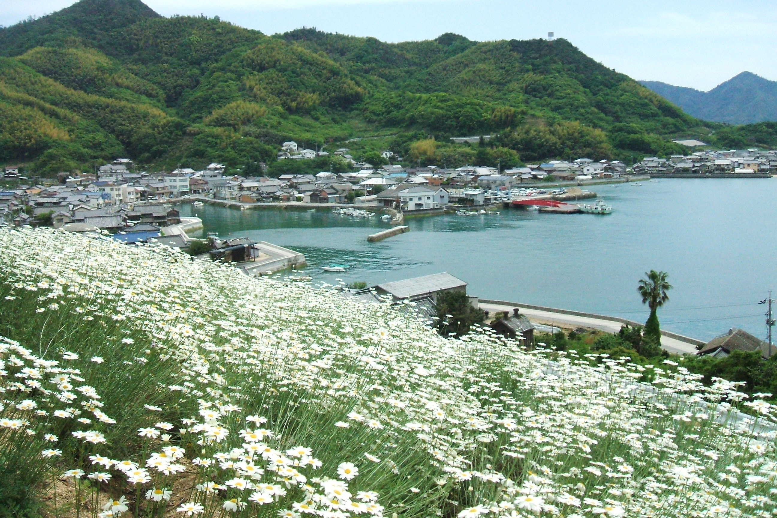 広島県尾道市因島重井西港の遠景。近くに写っているのは除虫菊（シロバナムシヨケギク）である。